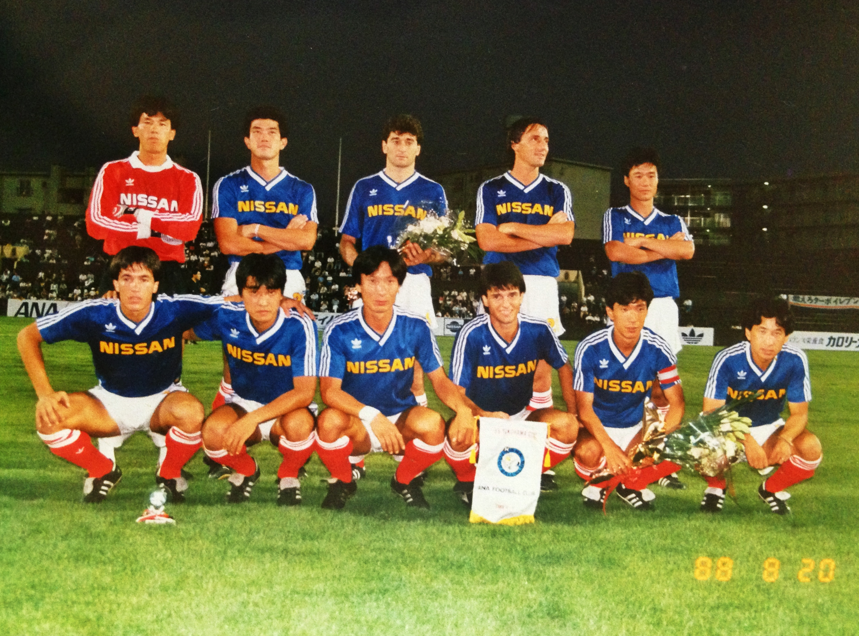 Jogo pelo Nissan FC